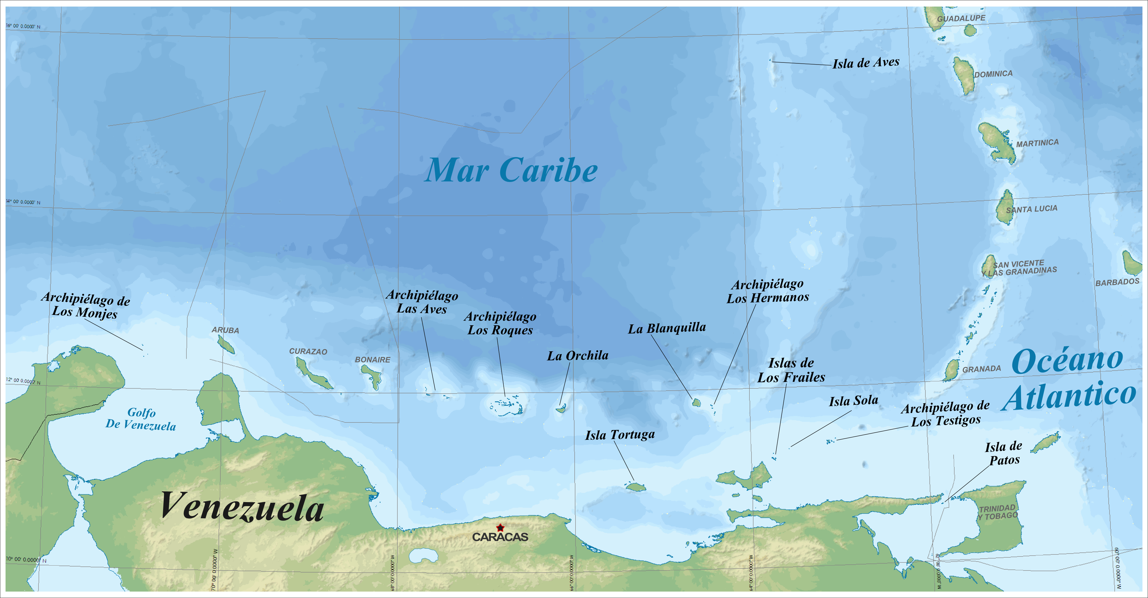 Mapa de ubicación de las Dependencias Federales de Venezuela